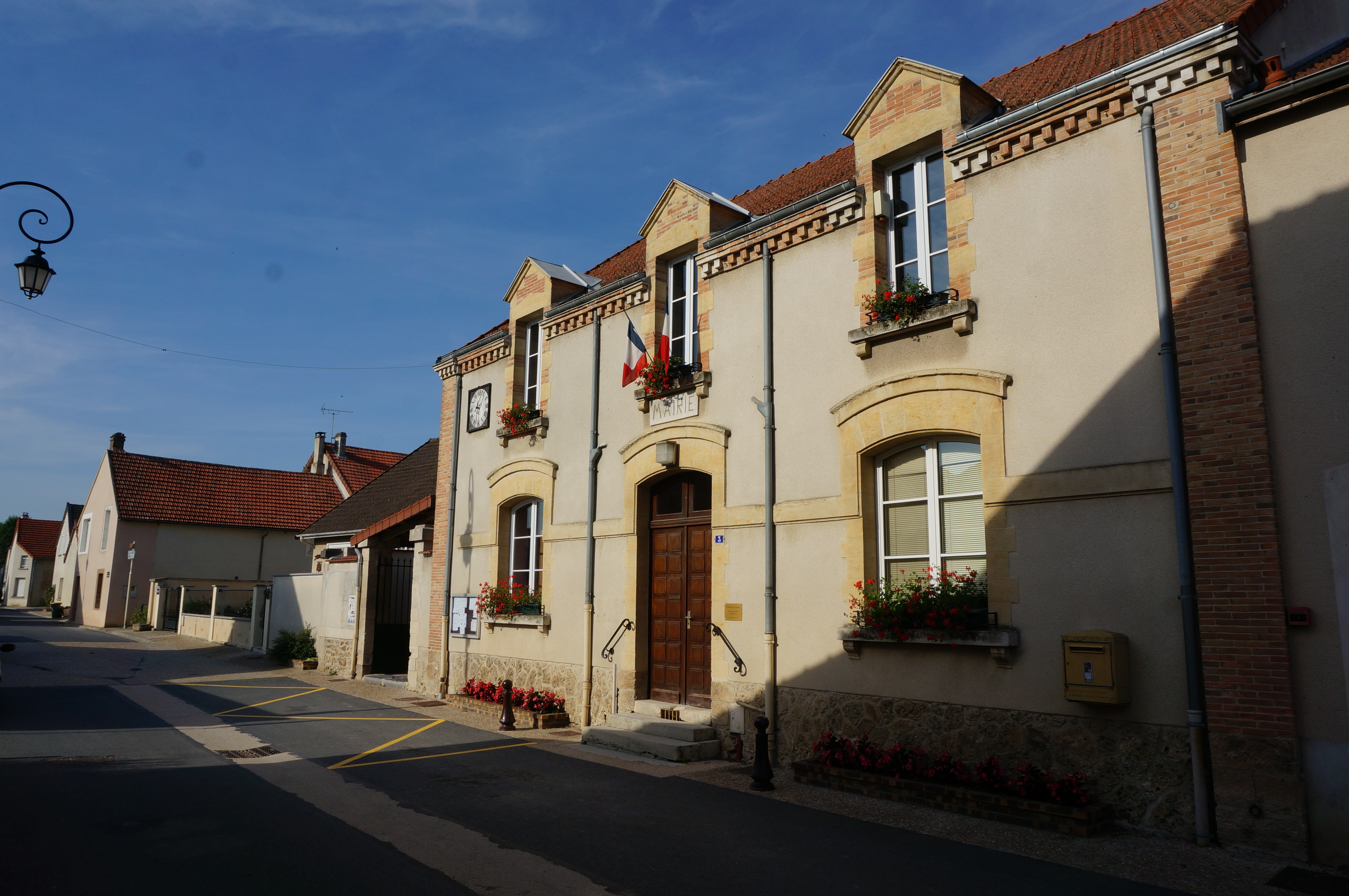 Mairie à Vaudemange.